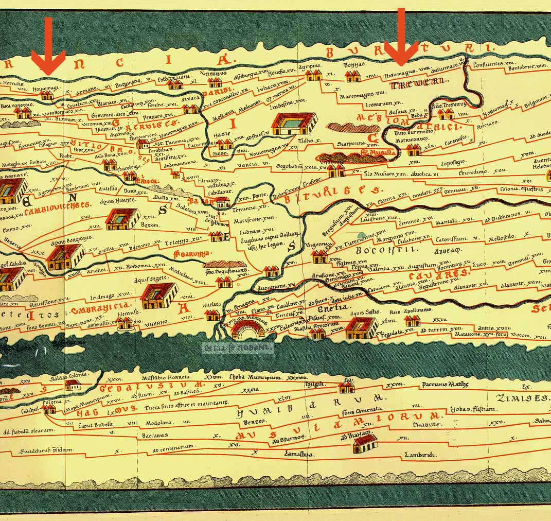 Ausschnitt aus der Tabula Peutingeriana mit dem Verlauf des Niedergermanischen Limes, südlicher Abschnitt zwischen der Ulpia Noviomagus Batavorum und Rigomagus